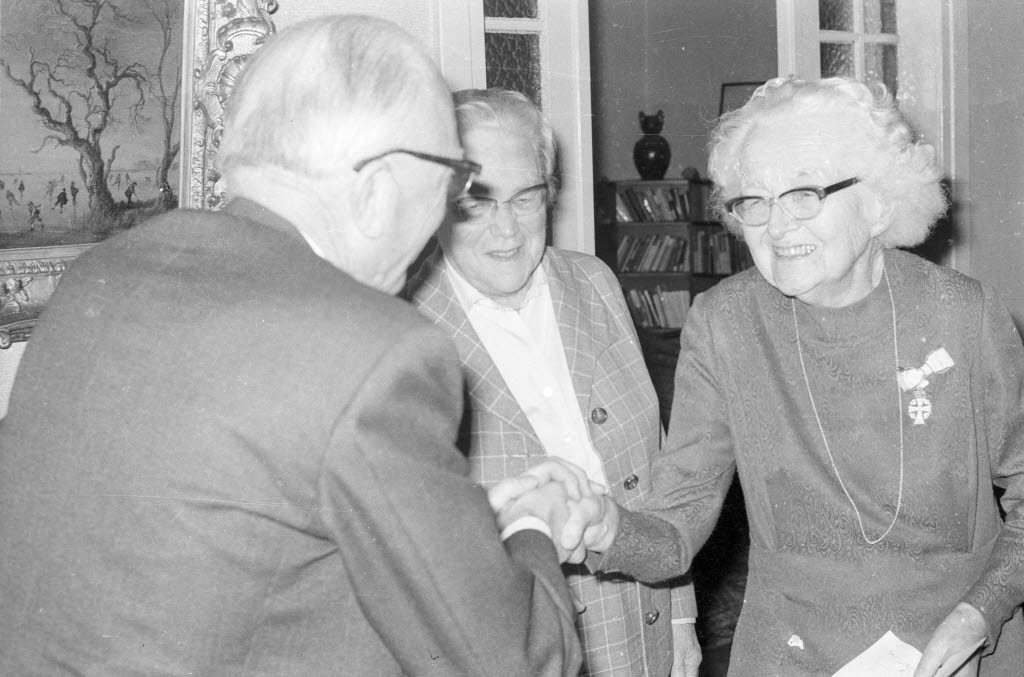 Prof. Lilli Martius (rechts) war langjährige Kustodin der Kieler Kunsthalle und empfängt die Auszeichnung in ihrer Wohnung in der Esmarchstraße 16 durch den dänischen Konsul Dr. Hans-Carl Rüdel (rechts).